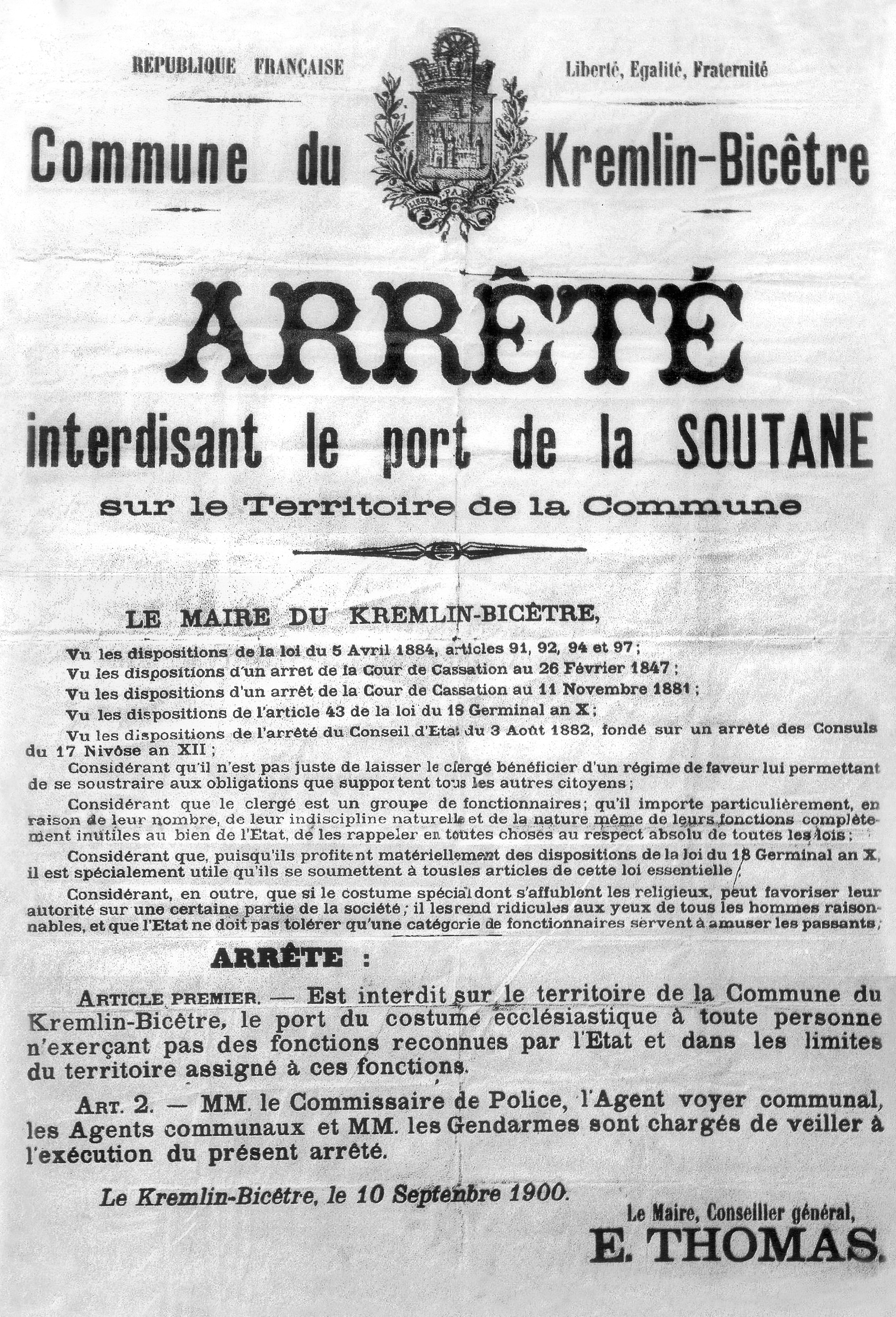 Arrêté interdisant le port de la soutane sur le territoire de la commune du Kremlin-Bicêtre, daté du 10 septembre 1900, signé par le maire Eugène Thomas.